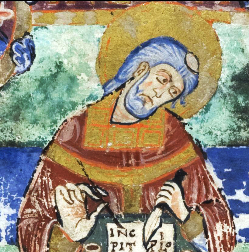 Венанций Фортунат. Миниатюра-портрет из "Vie de Sainte Radegonde par Venance Fortunat". ок. 1100